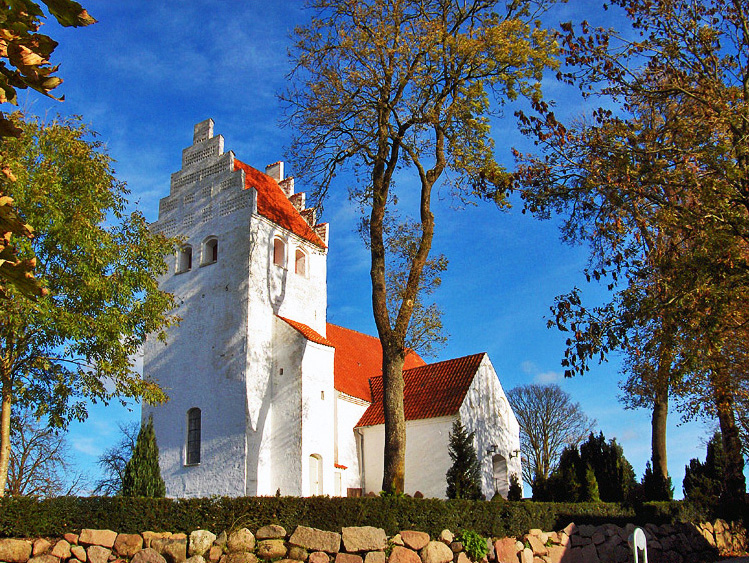 fra sydvest